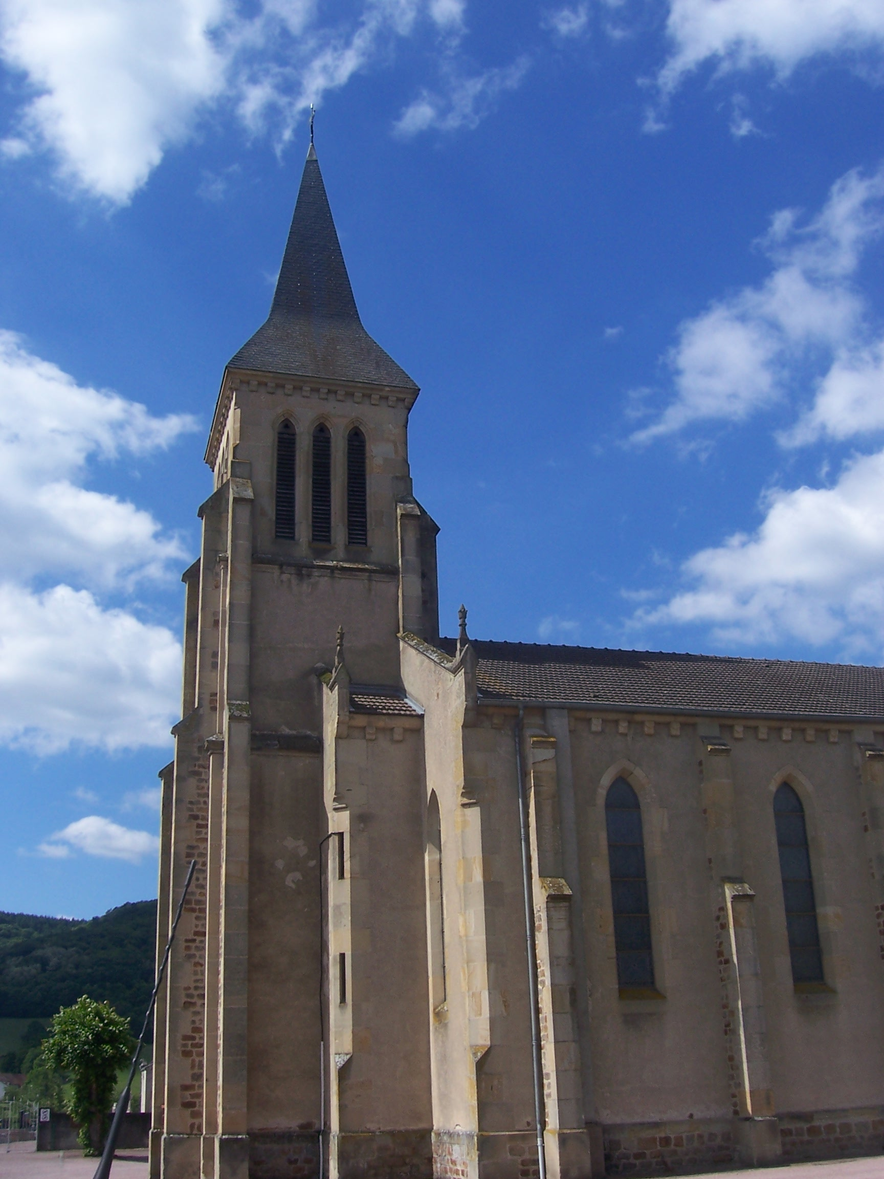 Eglise de Marmagne